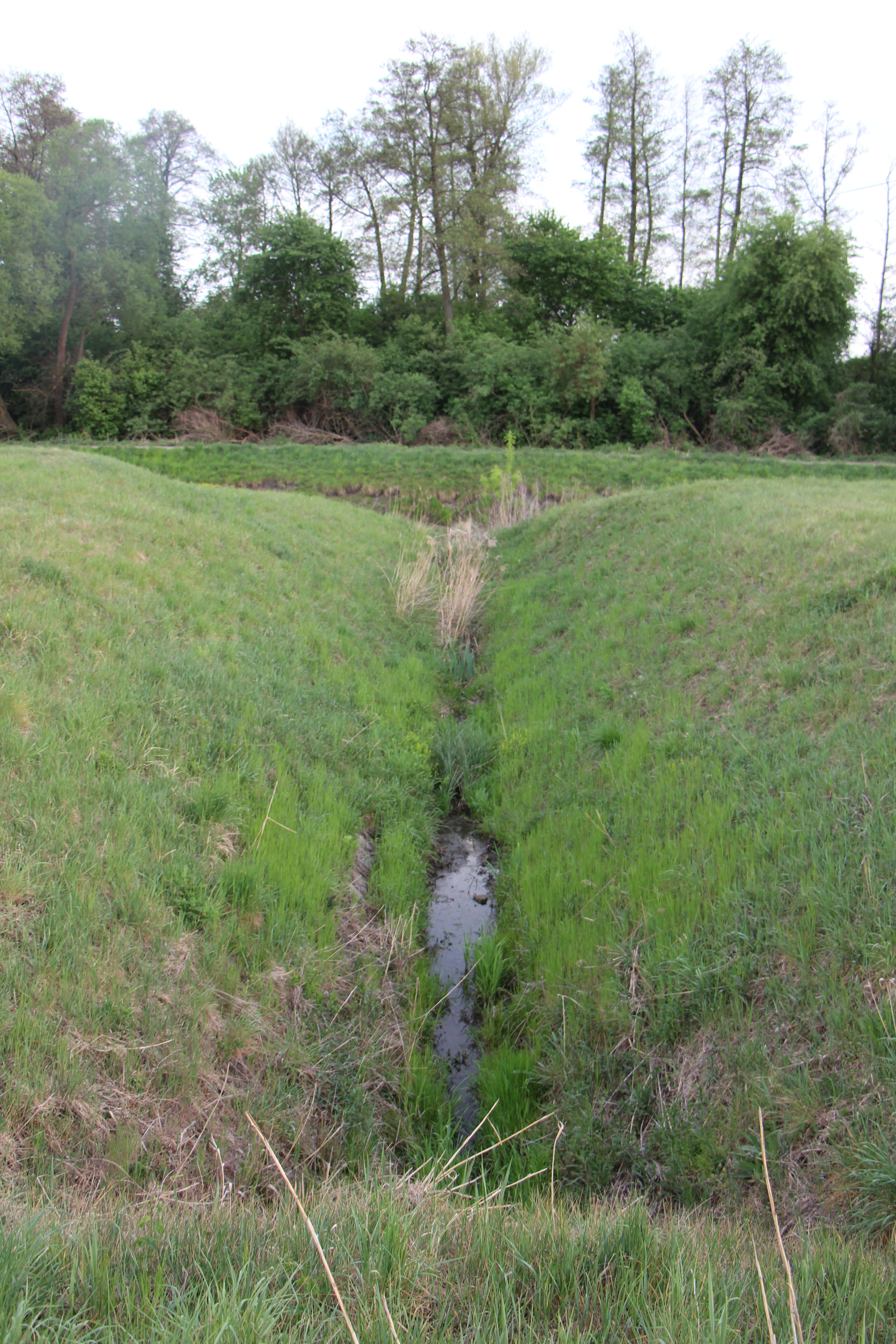 Hon Nové pole A pred ústim do Maliny